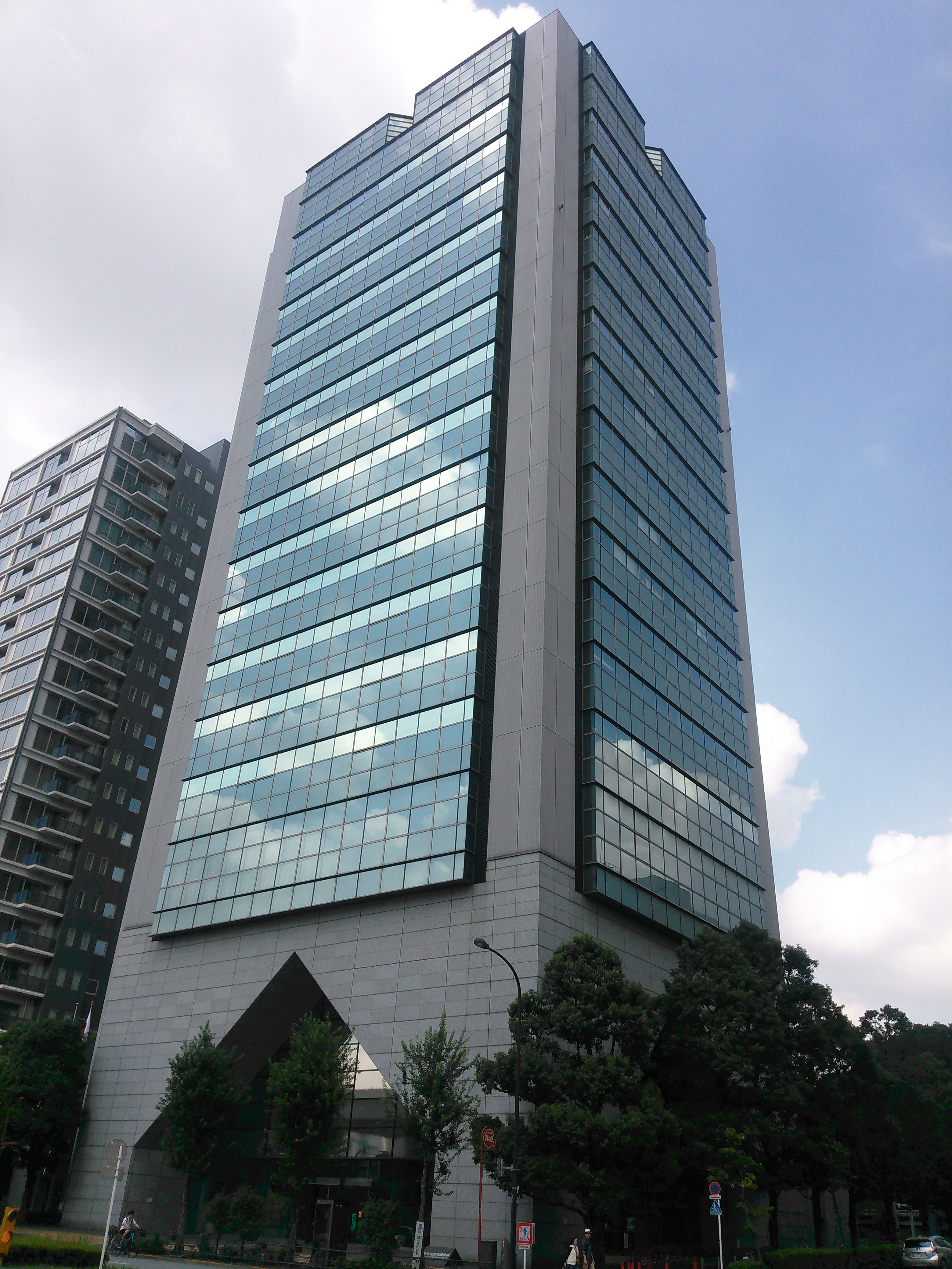 東京都文京区後楽、住宅金融支援機構本店ビル